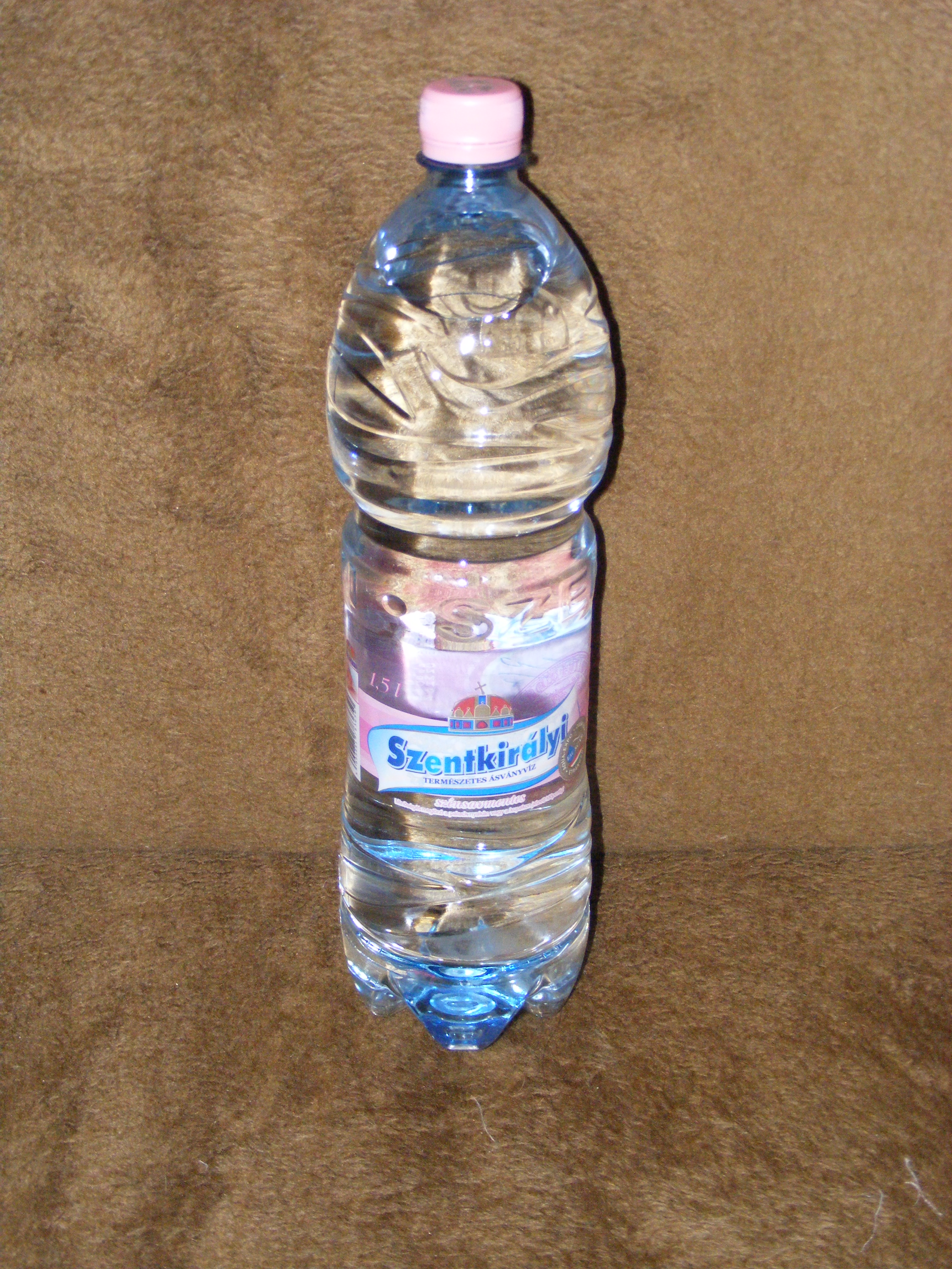 Botelo de mineralaakvo el vilaĝo Szentkirály